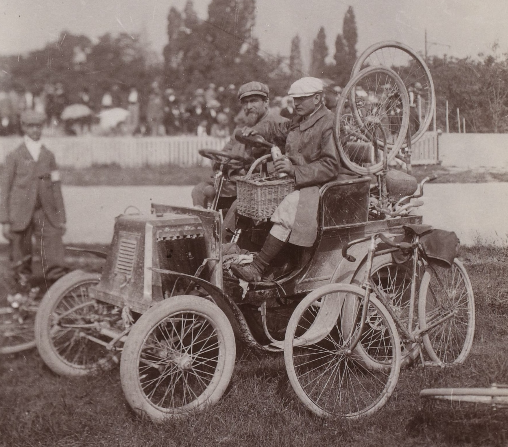 [Collection Jules Beau. Photographie sportive] : T. 14. Année 1901 / Jules Beau : F. 31. [Course Paris - Brest du Petit Journal, 16 août 1901]